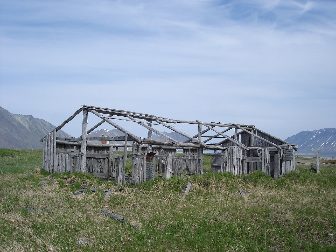 Историко-культурный комплекс «Пловер»: на двух сходящихся галечных косах, образующих в глубине бухты Провидения бухту Пловер, Чукотский автономный округ